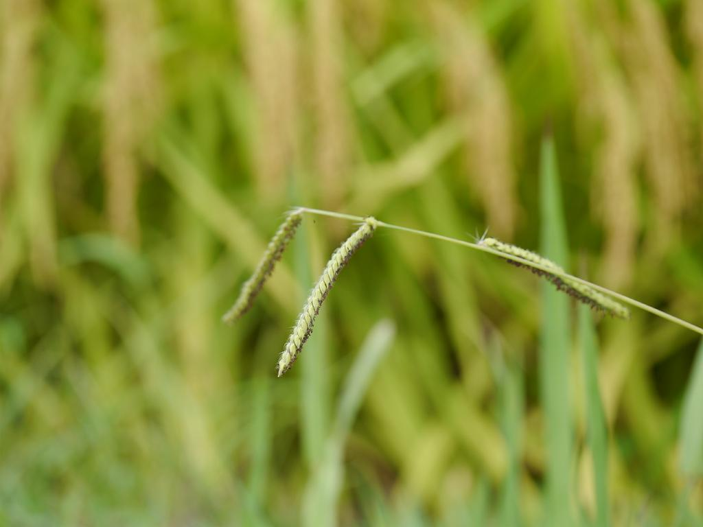 Paspalum dilatatum：シマスズメノヒエ 和歌山県田辺市2013年8月24日 本人撮影